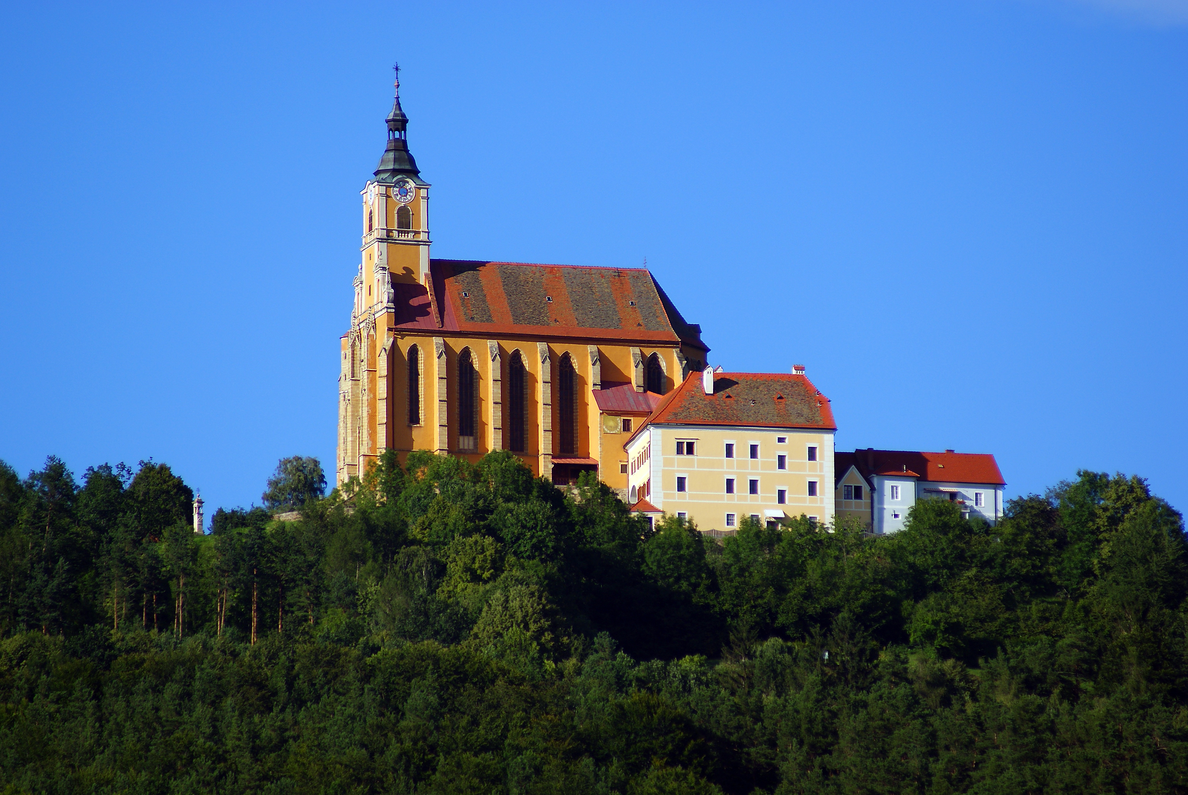 Kath. Pfarr- und Wallfahrtskirche hl. Maria